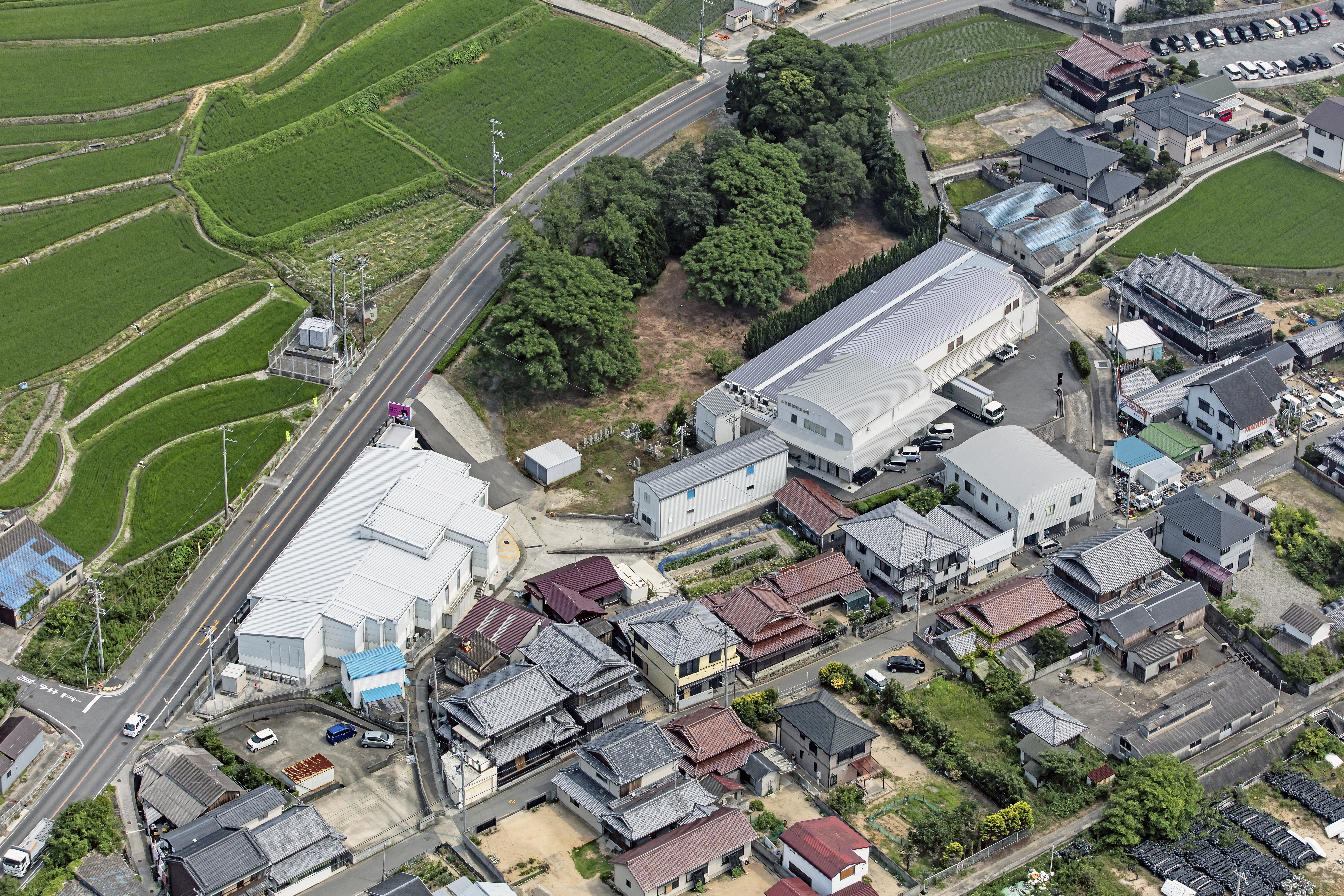 会社外観